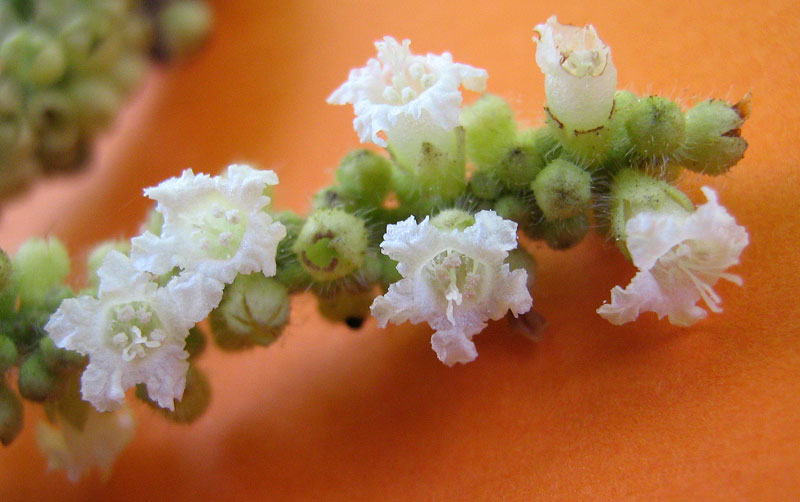 Varronia curassavica Jacq.